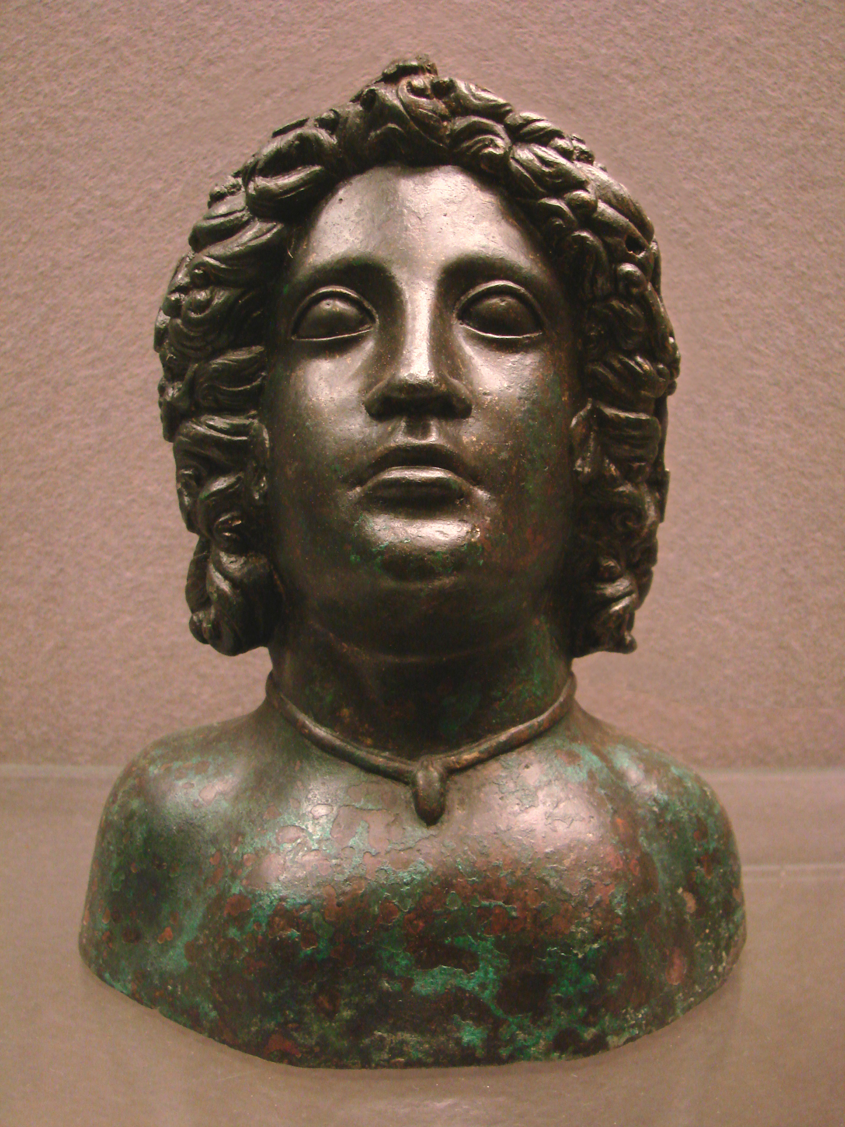 Buste de Bacchus juvénile, curseur de balance, bronze au plomb (15 kg), 3ème s. + JC. Trouvé à Dury, rocade sud d'Amiens. Musée de Picardie à Amiens.